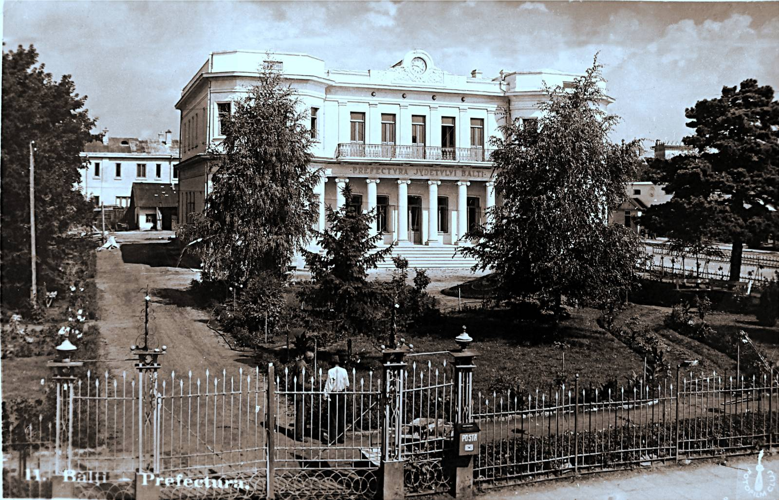 Prefectura judeţului Bălţi interbelic